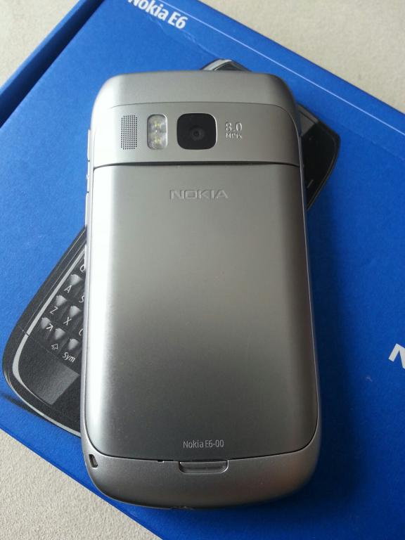 Nokia E6 Biała tył